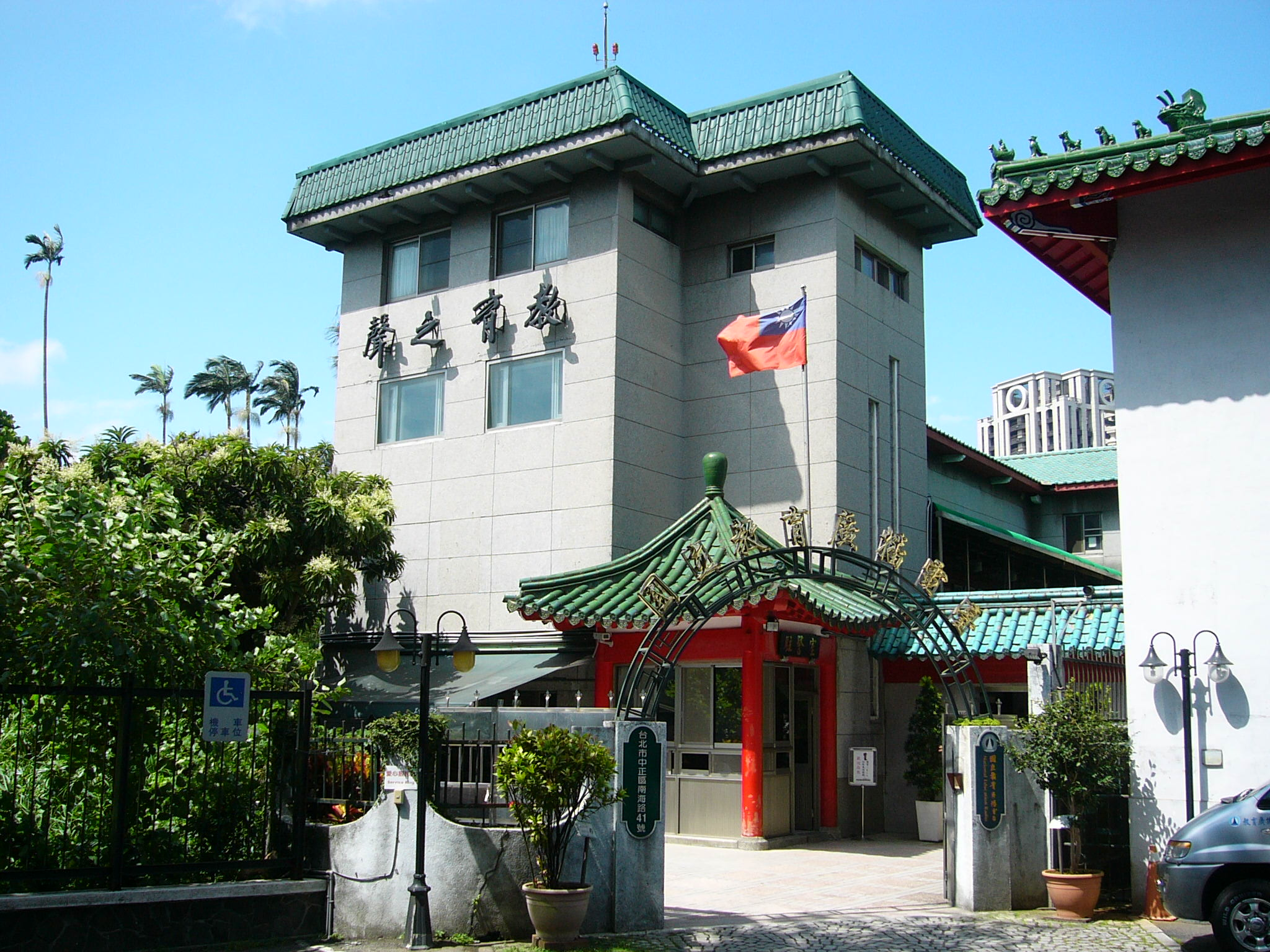 中文（台灣）: 國立教育廣播電臺總臺，位於臺北市中正區南海路41號。